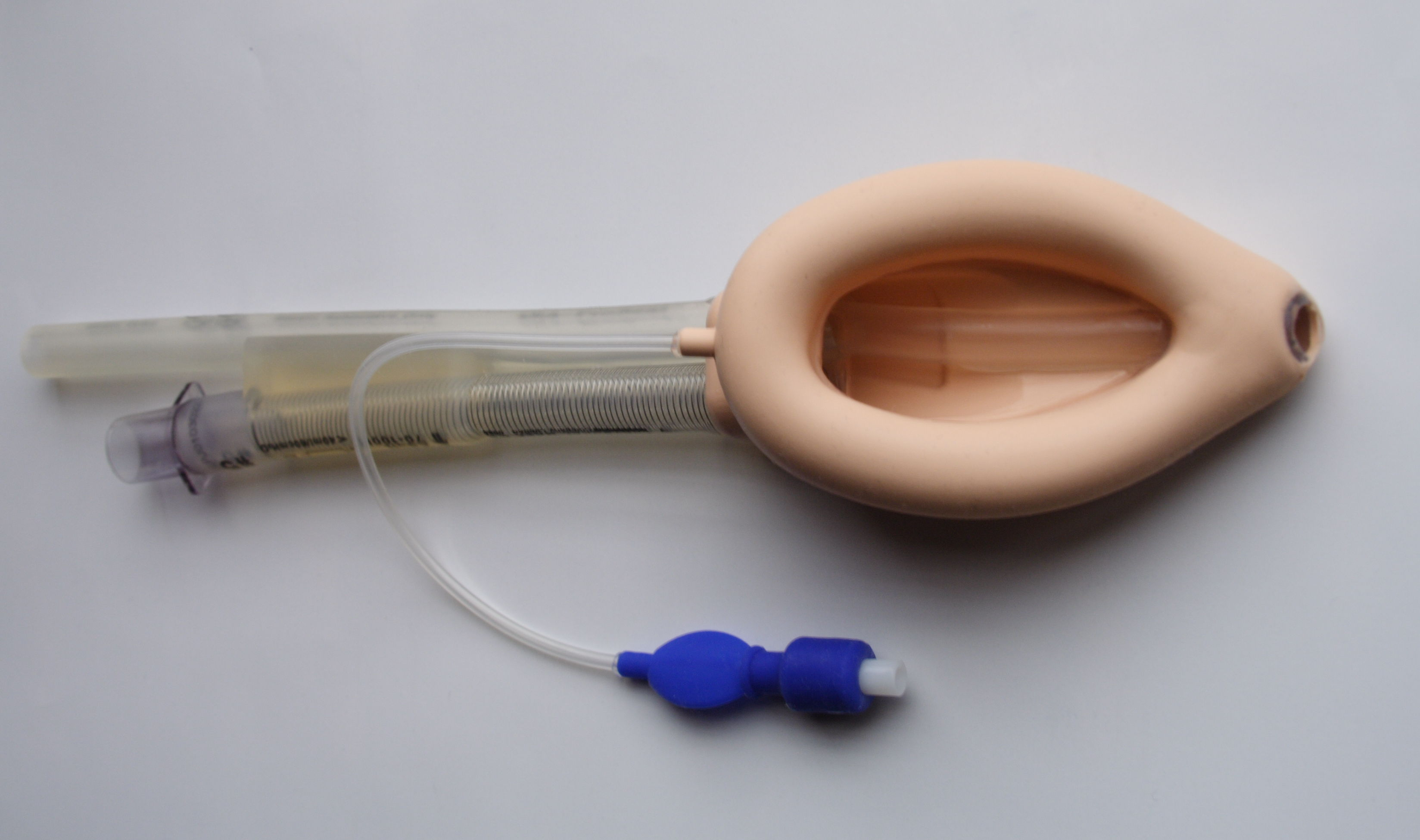 Laryngeal Mask Airway - ProSeal (TM)/ラリンゲアルマスク（ラリンゲルマスク・ラリンギアルマスク）